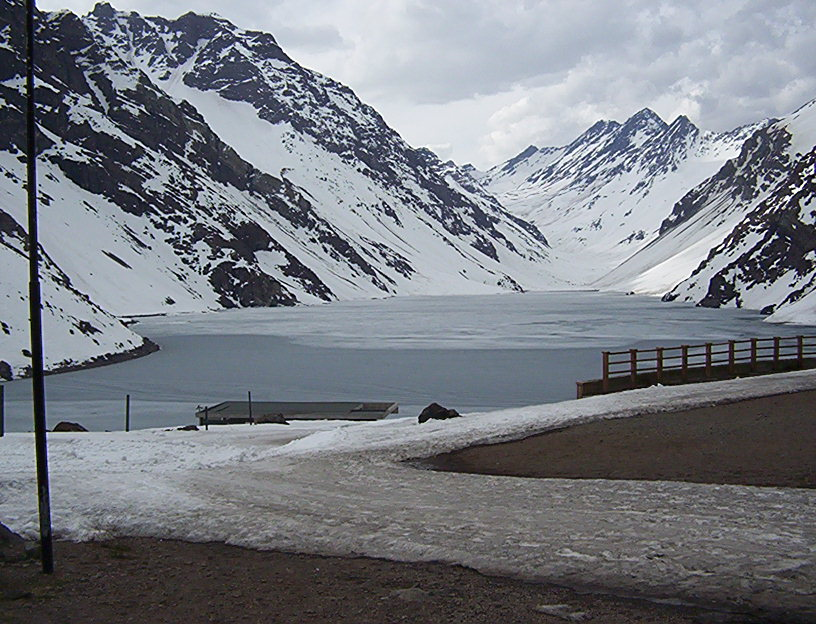 Laguna situada en la localidad de Portillo en la Cordillera de los Andes en Chile